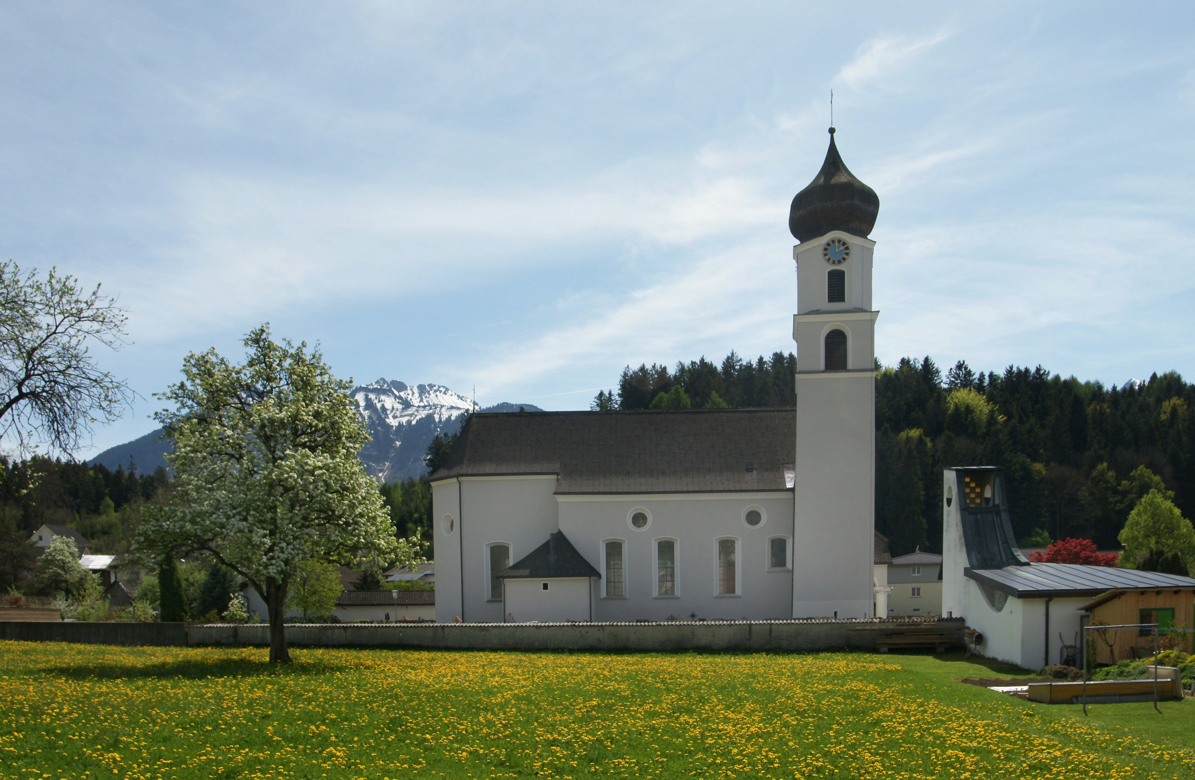 Pfarrkirche "Unsere Liebe Frau Unbefleckte Empfängnis" in Schlins, Vorarlberg.